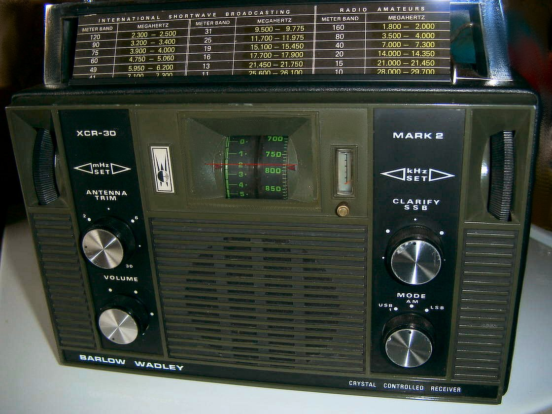 Radio Barlow Wadley XCR-30, selbst fotografiert, Lizenz: GNU-FDL